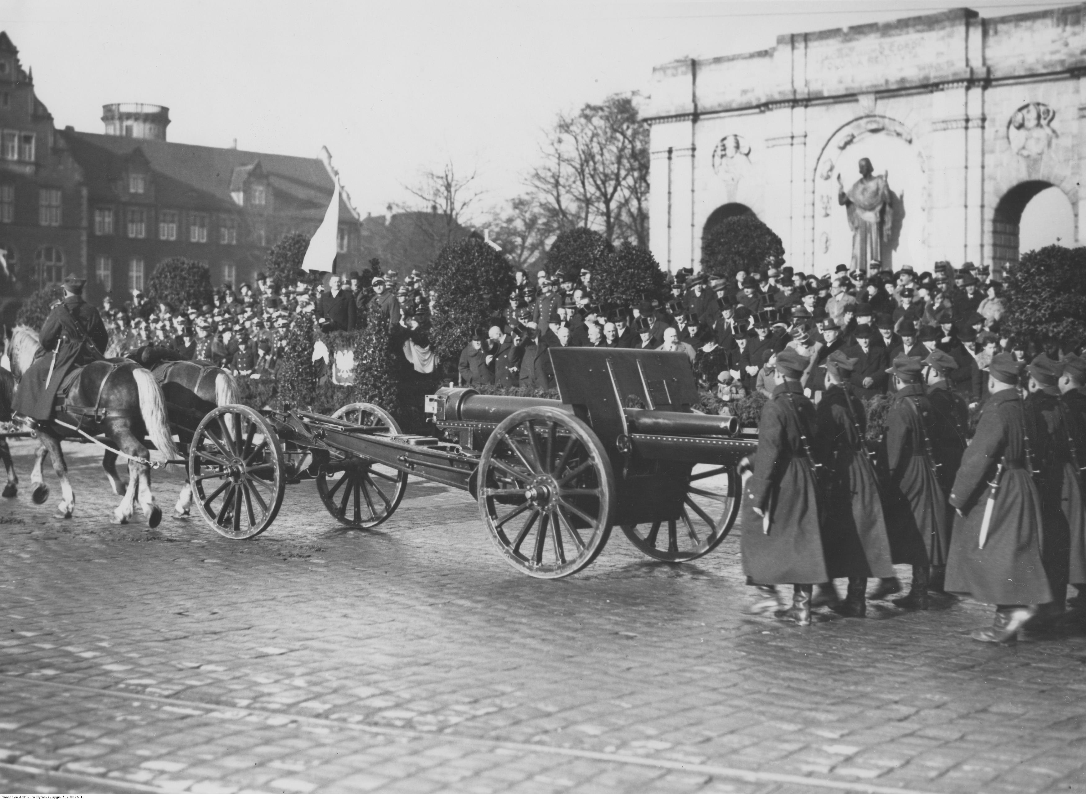 Obchody Święta Niepodległości w Poznaniu. 105 mm armata dalekonośna Schneider wz. 13 w zaprzęgu konnym podczas defilady. Na trybunie honorowej stoją m.in. dowódca OK VII Poznań generał Edmund Knoll-Kownacki, wojewoda poznański Artur Maruszewski. W głębi widoczny pomnik Wdzięczności (ku czci Najświętszego Serca Jezusowego). Koncern Ilustrowany Kurier Codzienny - Archiwum Ilustracji. Sygnatura: 1-P-3026-1